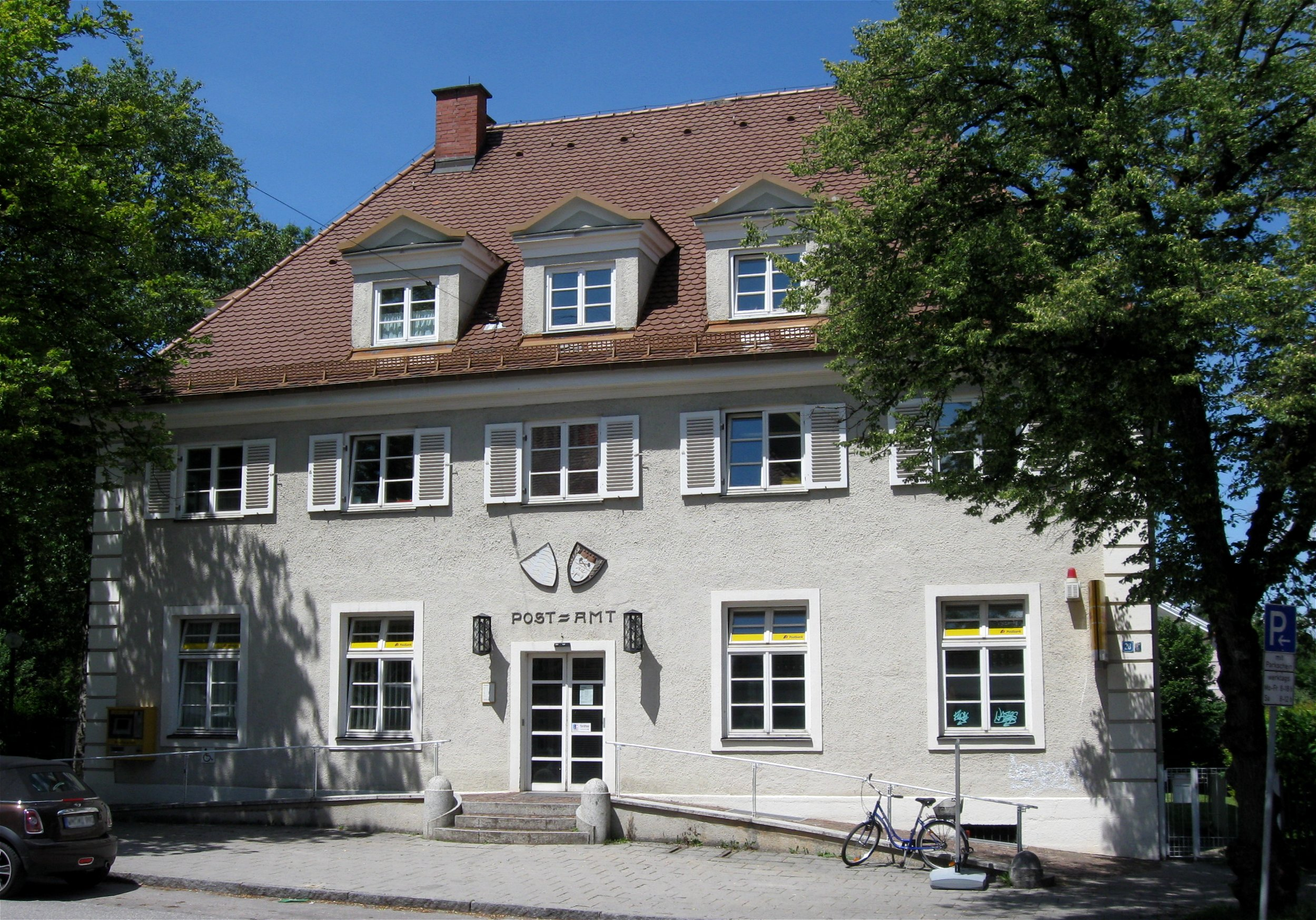 Philippstraße 28; Postamt, mit Walmdach und Putzgliederungen, 1924 von Robert Vorhoelzer und Franz Lochbrunner.